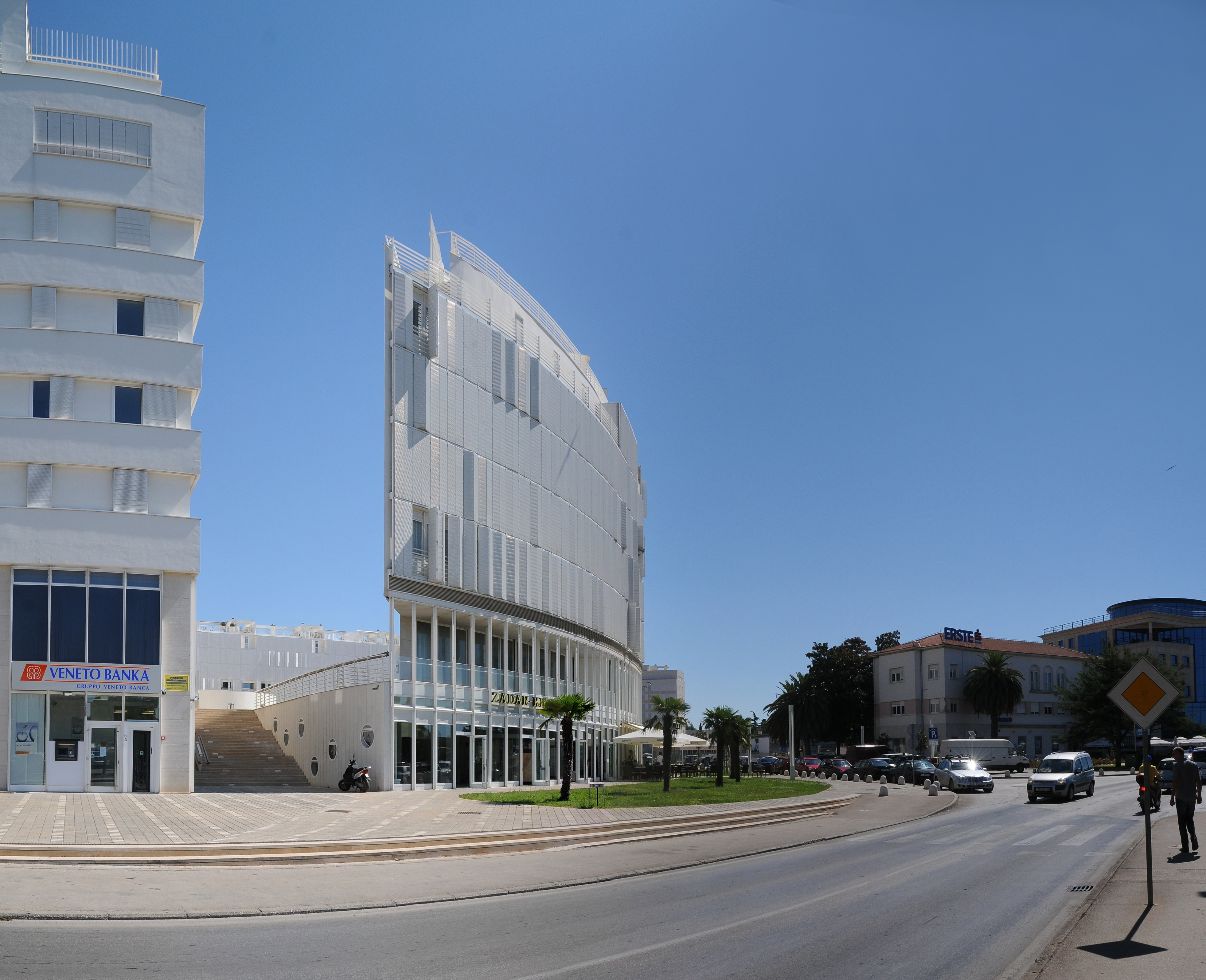 Bankenviertel an der Obala Kneza Branimira in Zadar. Erbaut nach Plänen des Architekt Nikola Bašić.